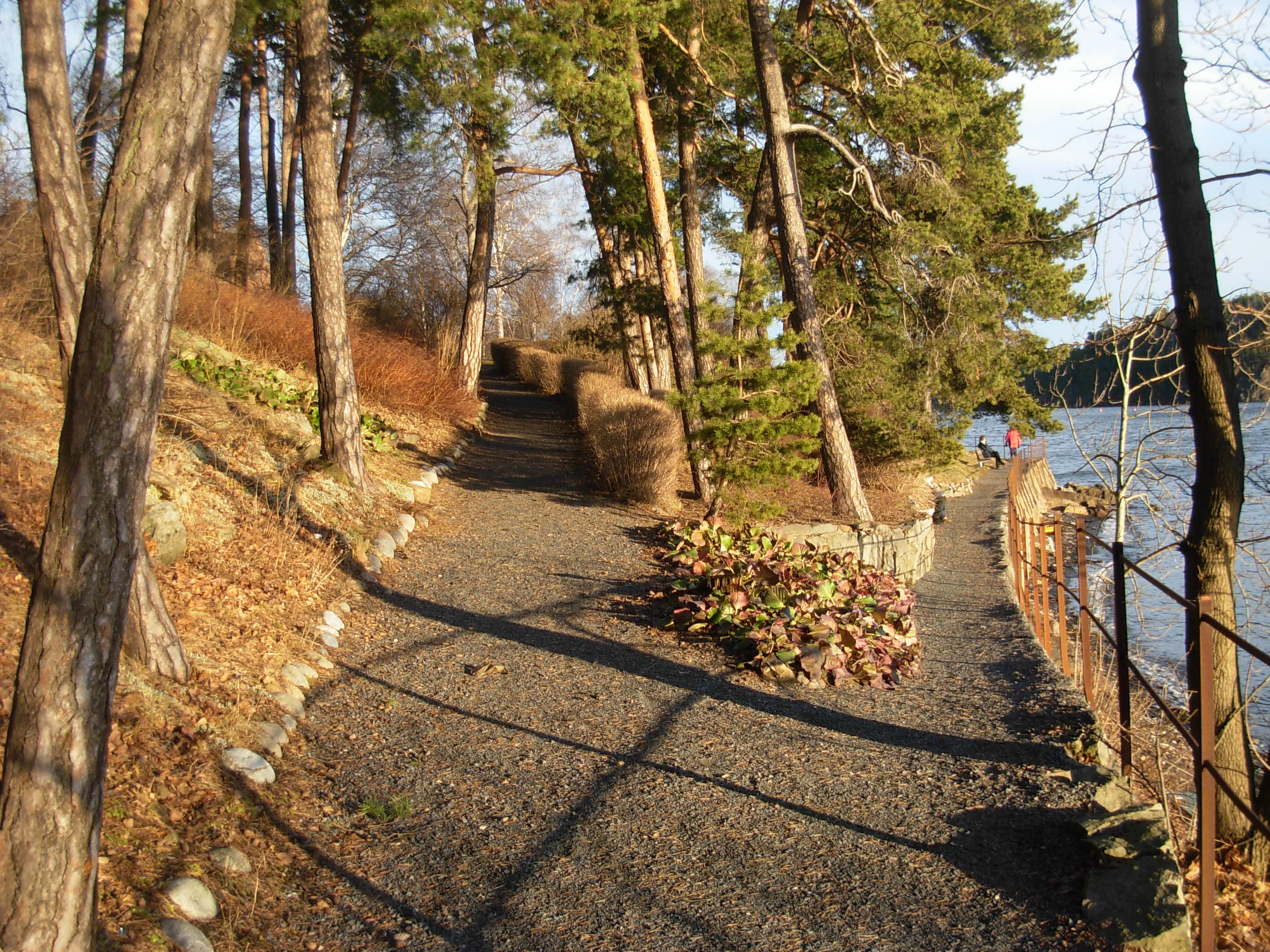 Vækerøparken, coast path (kyststi), Oslo